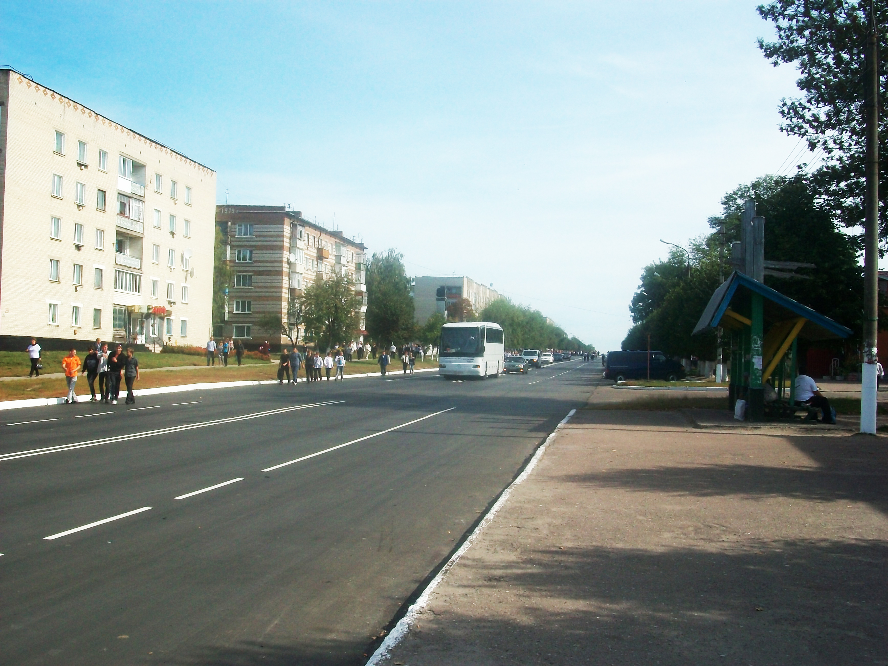 Путивль. Центральная улица